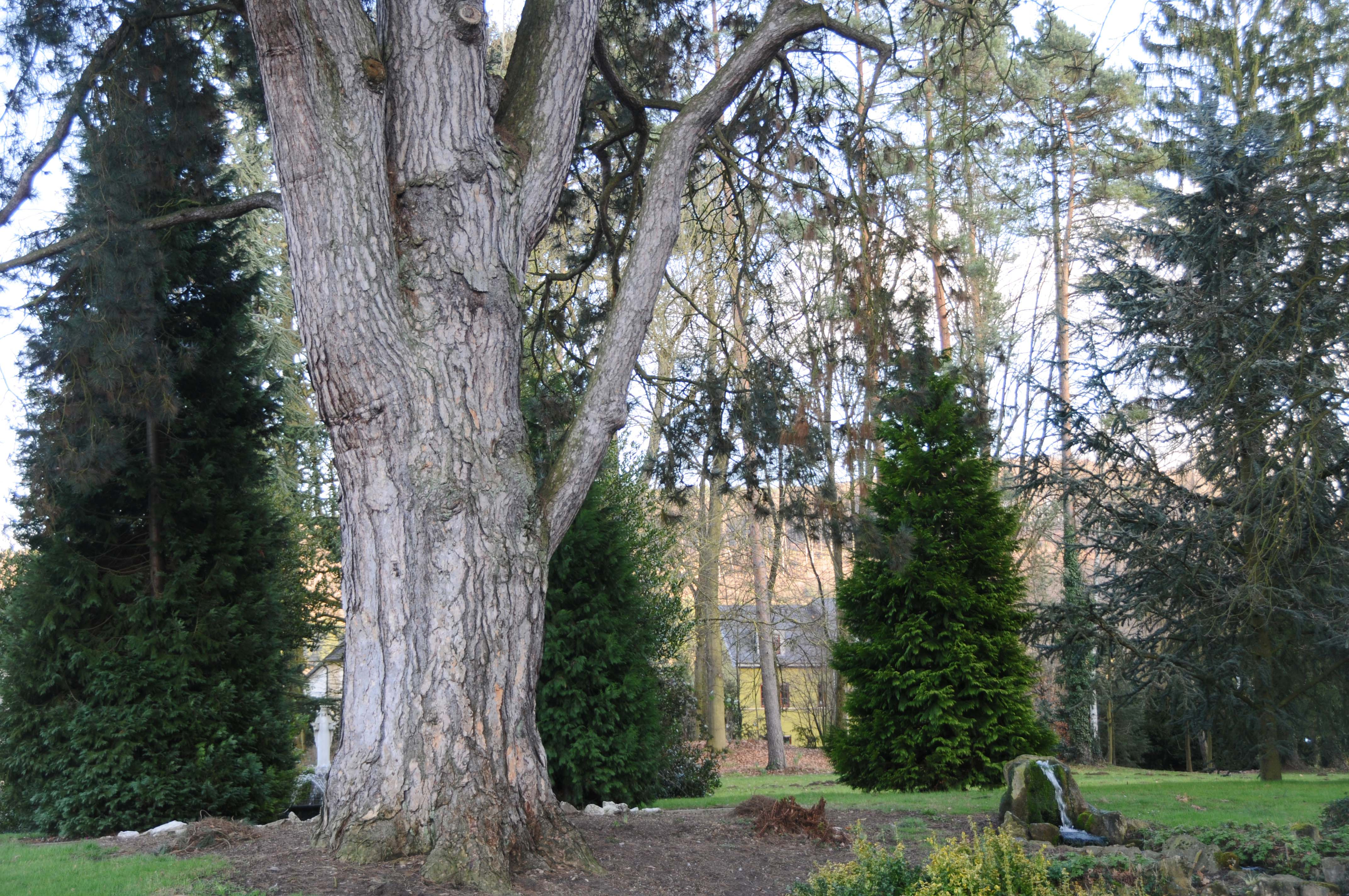 Schwaarzkifer am Park zu Heeschdref.